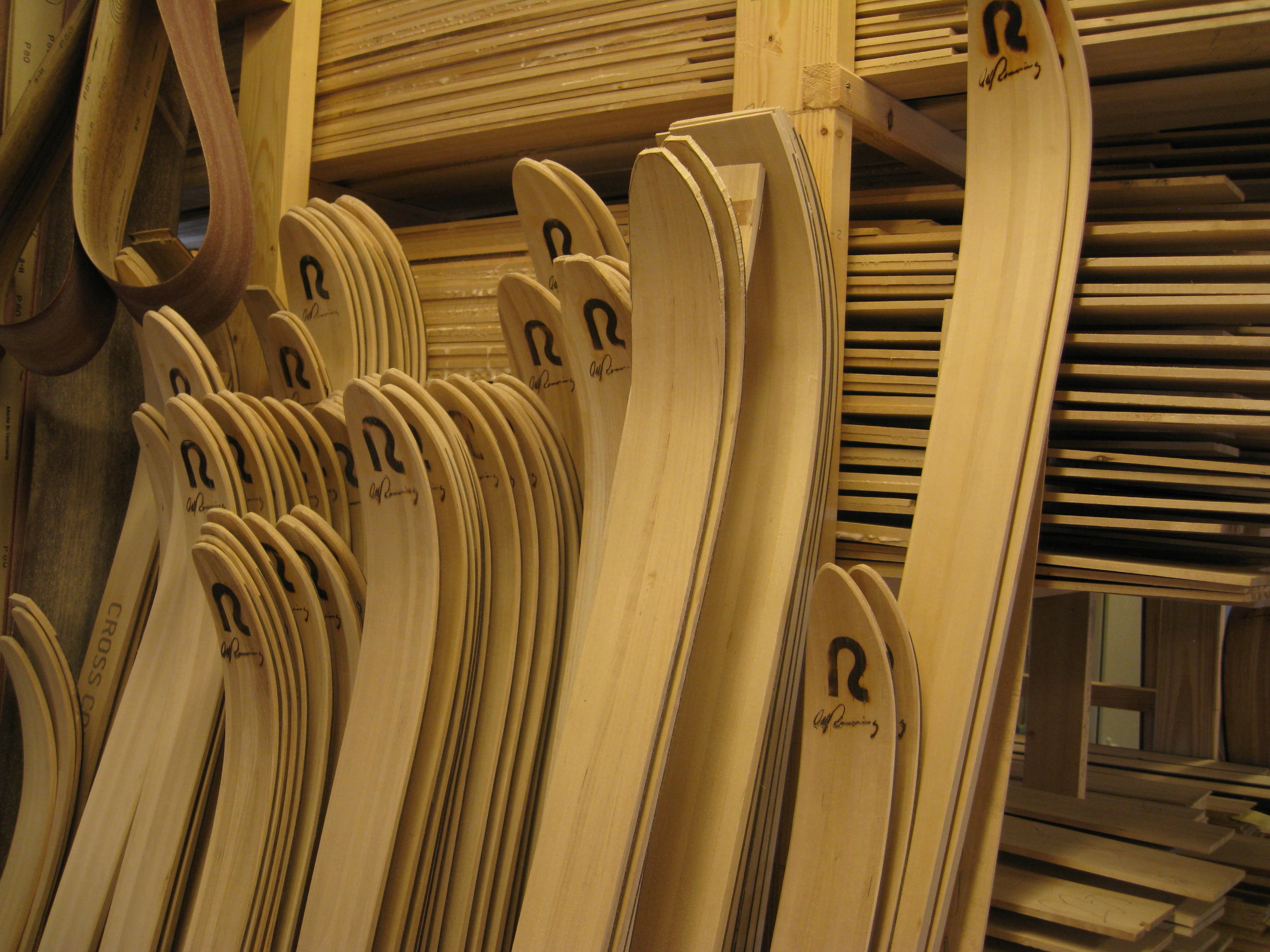 Bilder av Rønning Treski modeller med trematerialer i bakgrunnen.